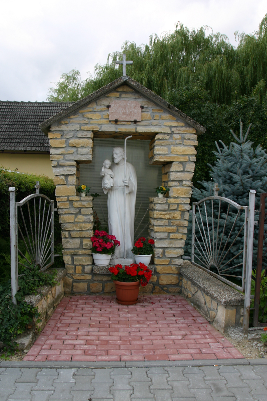 Dębina (dodatkowa nazwa w j. niem. Dambine) – wieś w Polsce położona w województwie opolskim, w powiecie prudnickim, w gminie Biała.